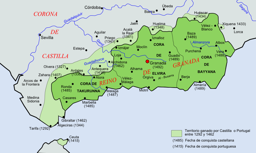 Reino Nazarí de Granada/ Nasrid Kingdom of Granada.